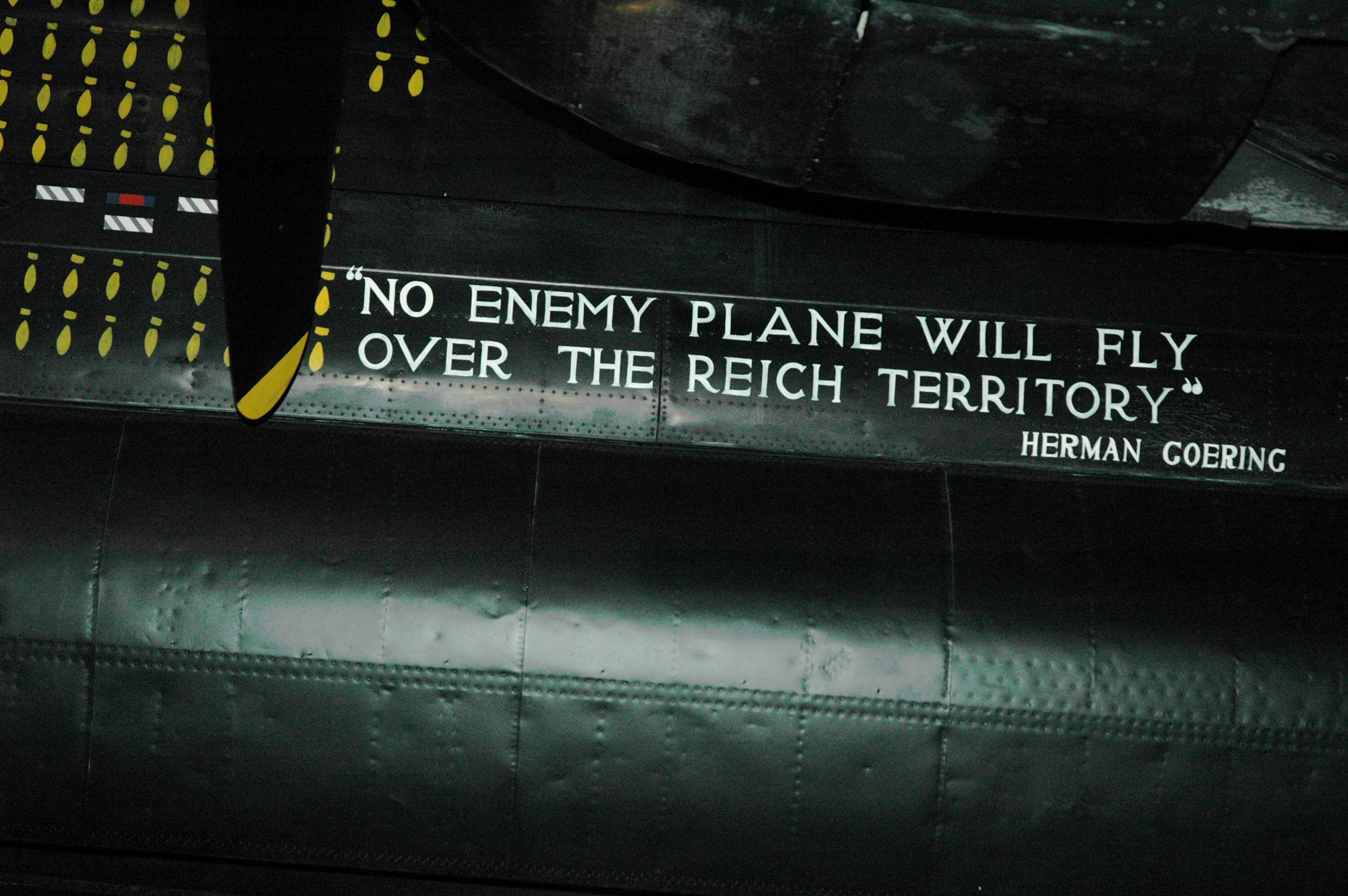 Iscrizione presente su un bombardiere inglese, conservato al RAF Museum Hendon, Londra, Regno Unito. La scritta significa: Nessuno aereo nemico volerà sui cieli del Reich.